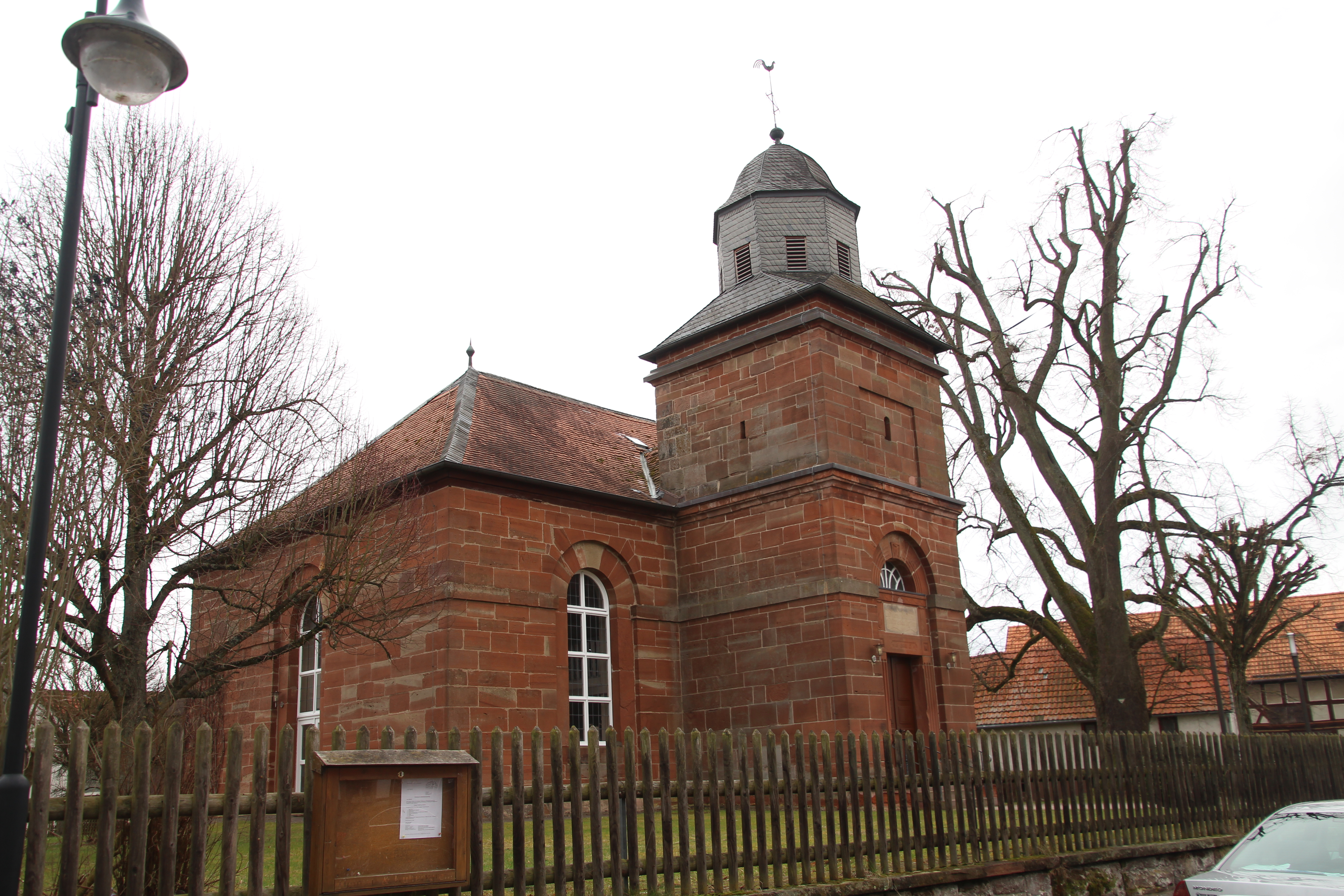 Siehe Bild und Dateiname